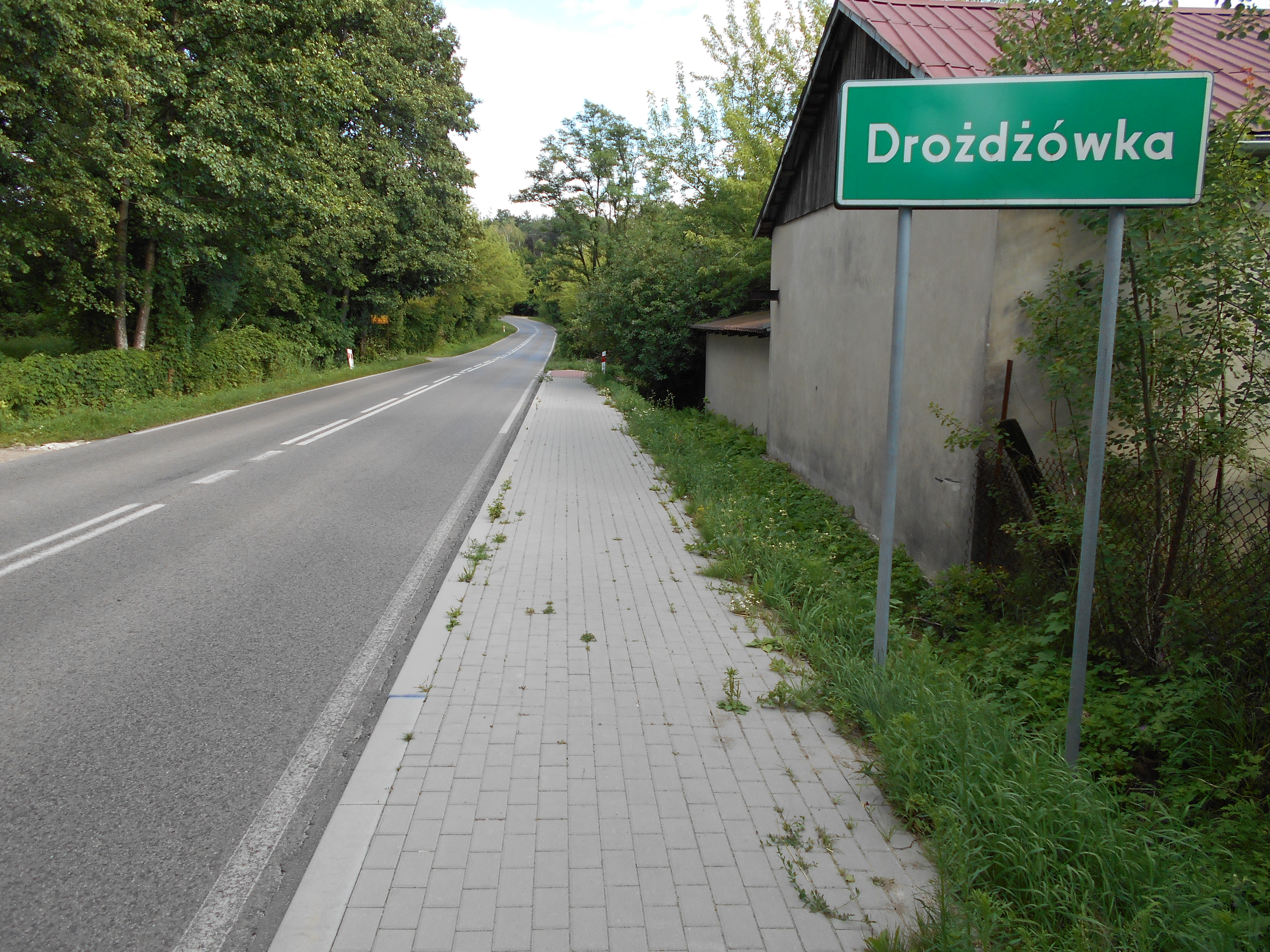 Miejscowość w gminie Siennica